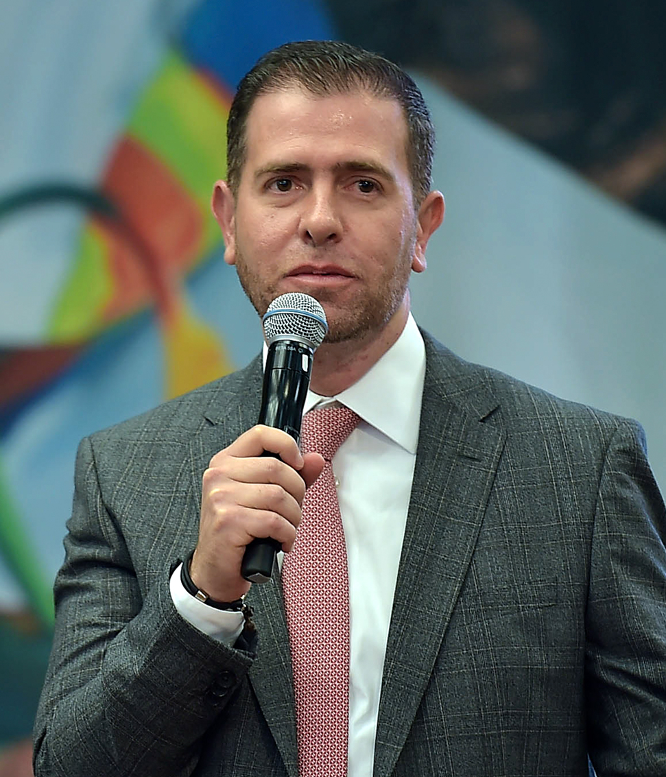 El Presidente Enrique Peña Nieto se reunió hoy con los deportistas que integraron la delegación mexicana que participó en los Juegos Olímpicos de Río de Janeiro 2016, a quienes les expresó su reconocimiento por el esfuerzo, la entrega, el empeño y el coraje que demostraron en esta justa olímpica y durante el proceso para llegar a ella.